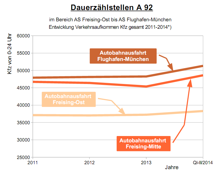 Verkehrsaufkommen Kfz 2004 bis 2014*) auf der A 92 erfasst durch die Dauerzählstellen Nr. 9182 AS Flughafen München, Nr. 9183 AS Freising-Mitte, Nr. 9184 AS Freising-Ost